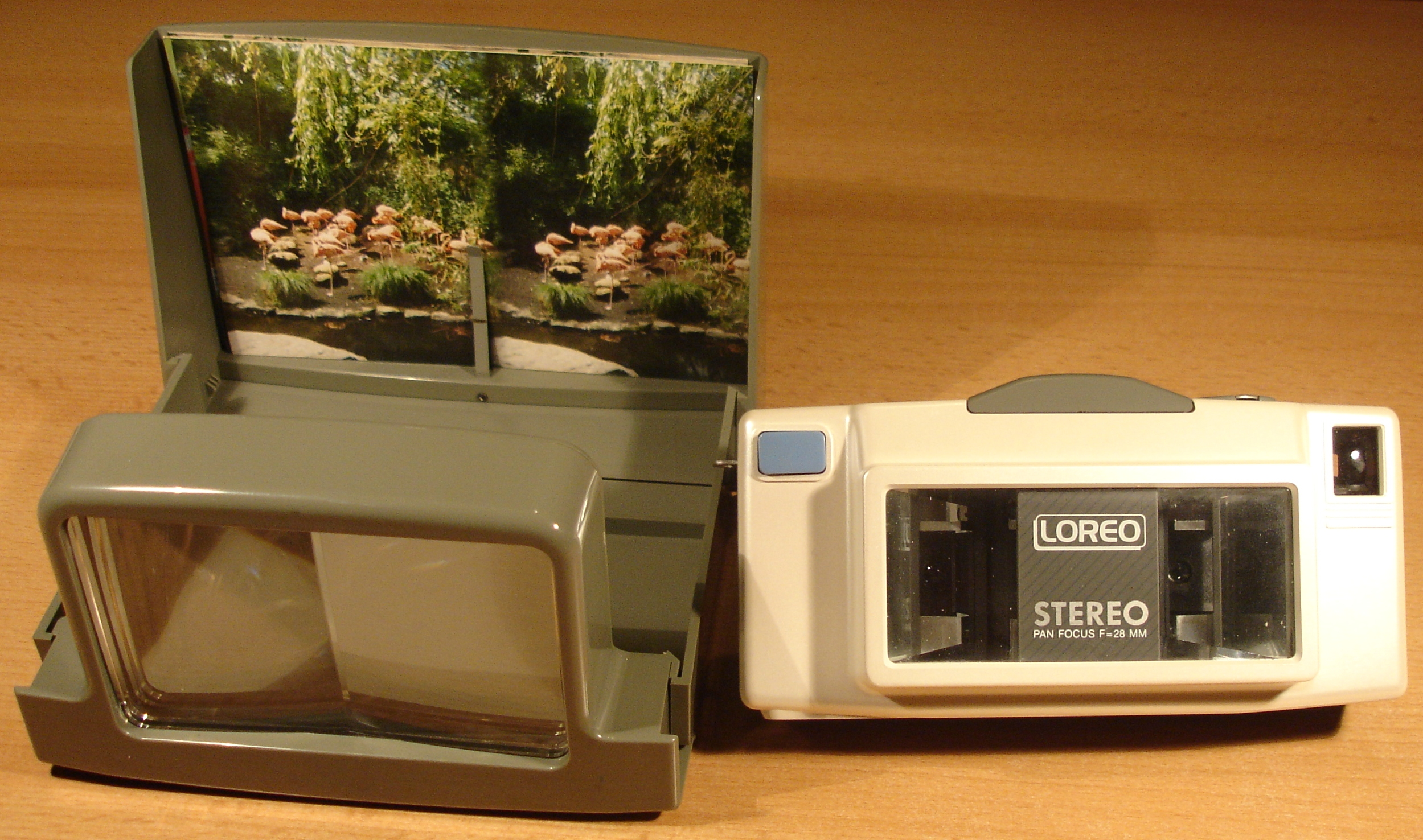 Stereocamera